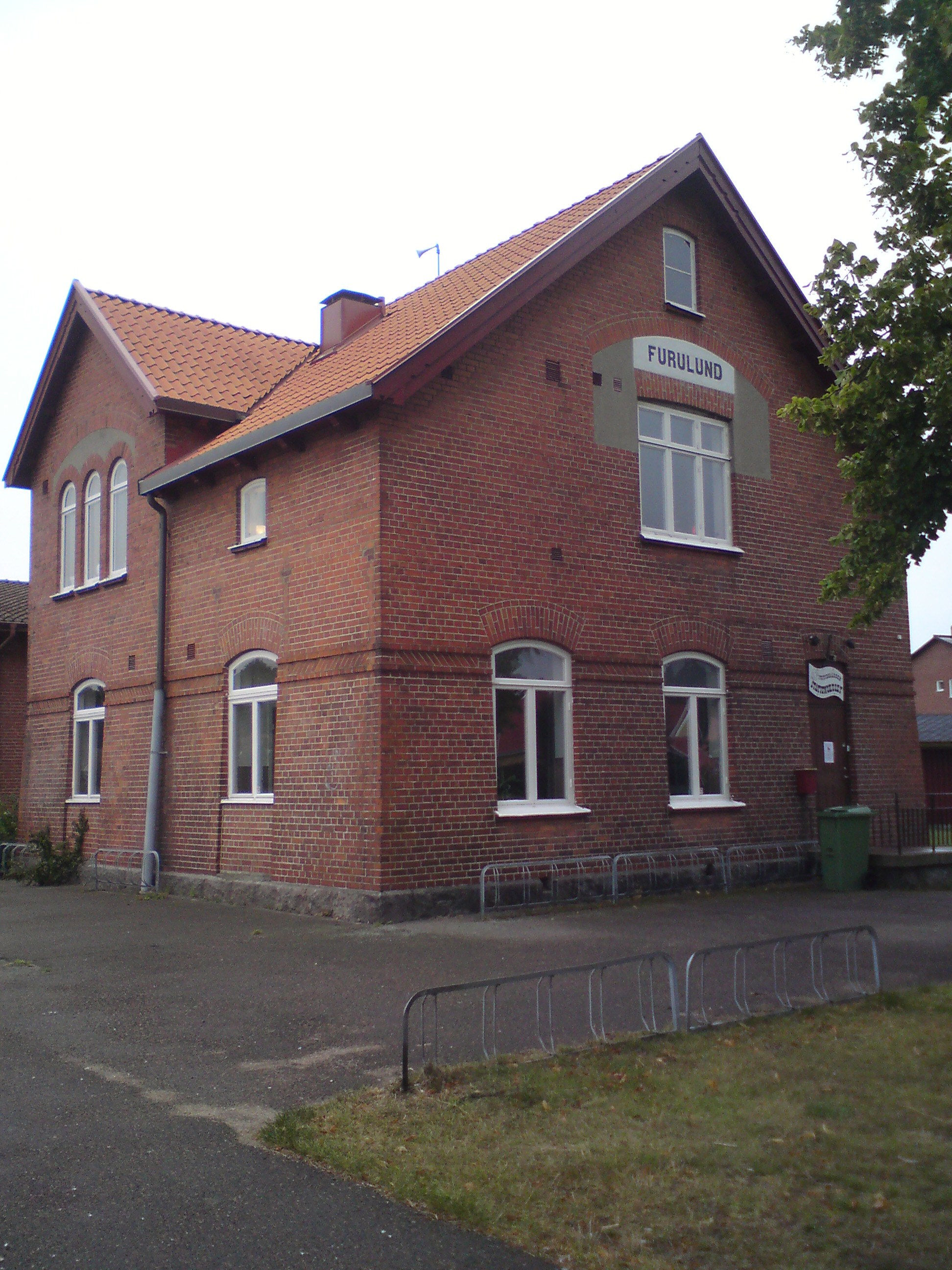 Furulunds stationshus